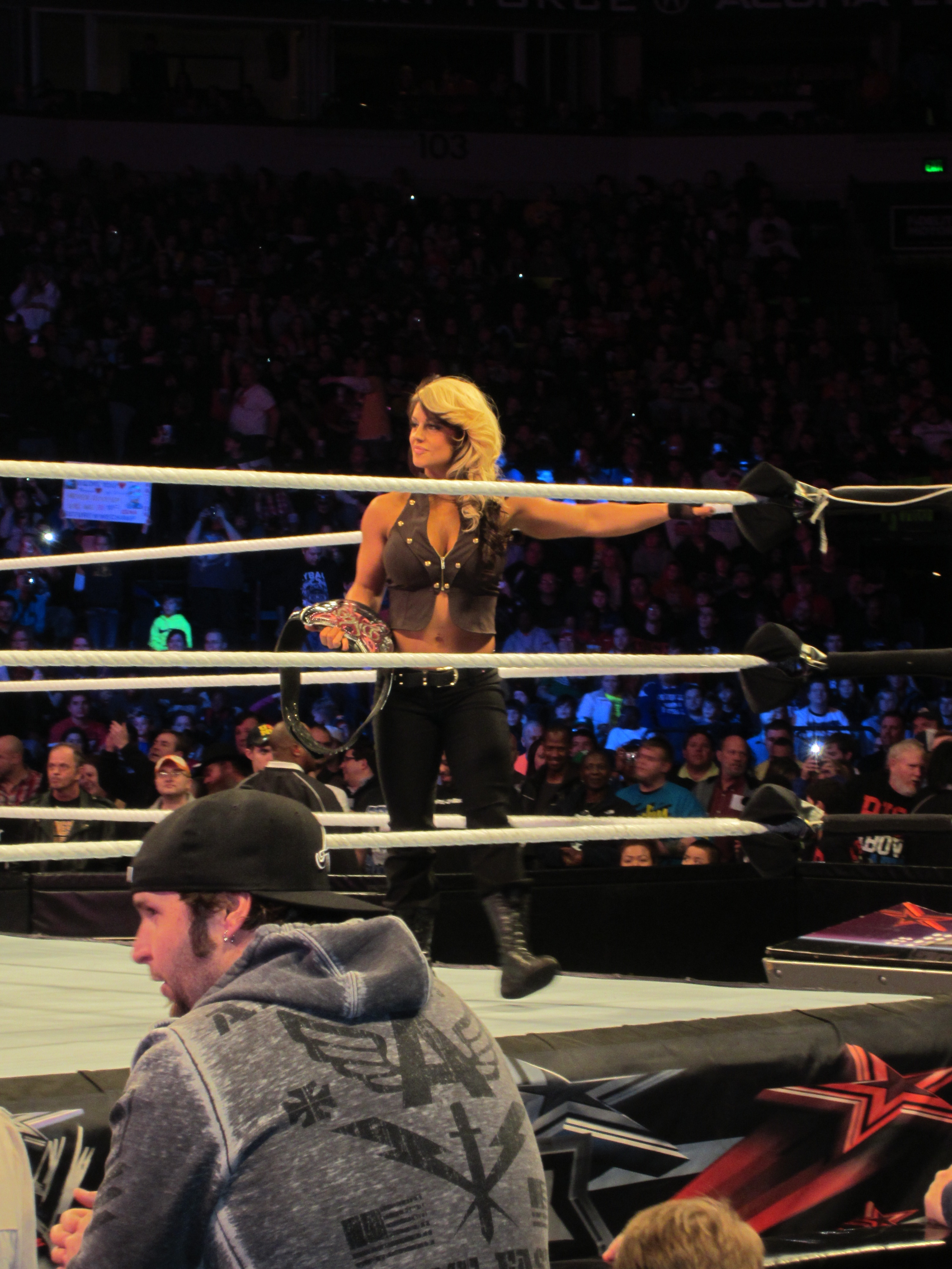 Kaitlyn II